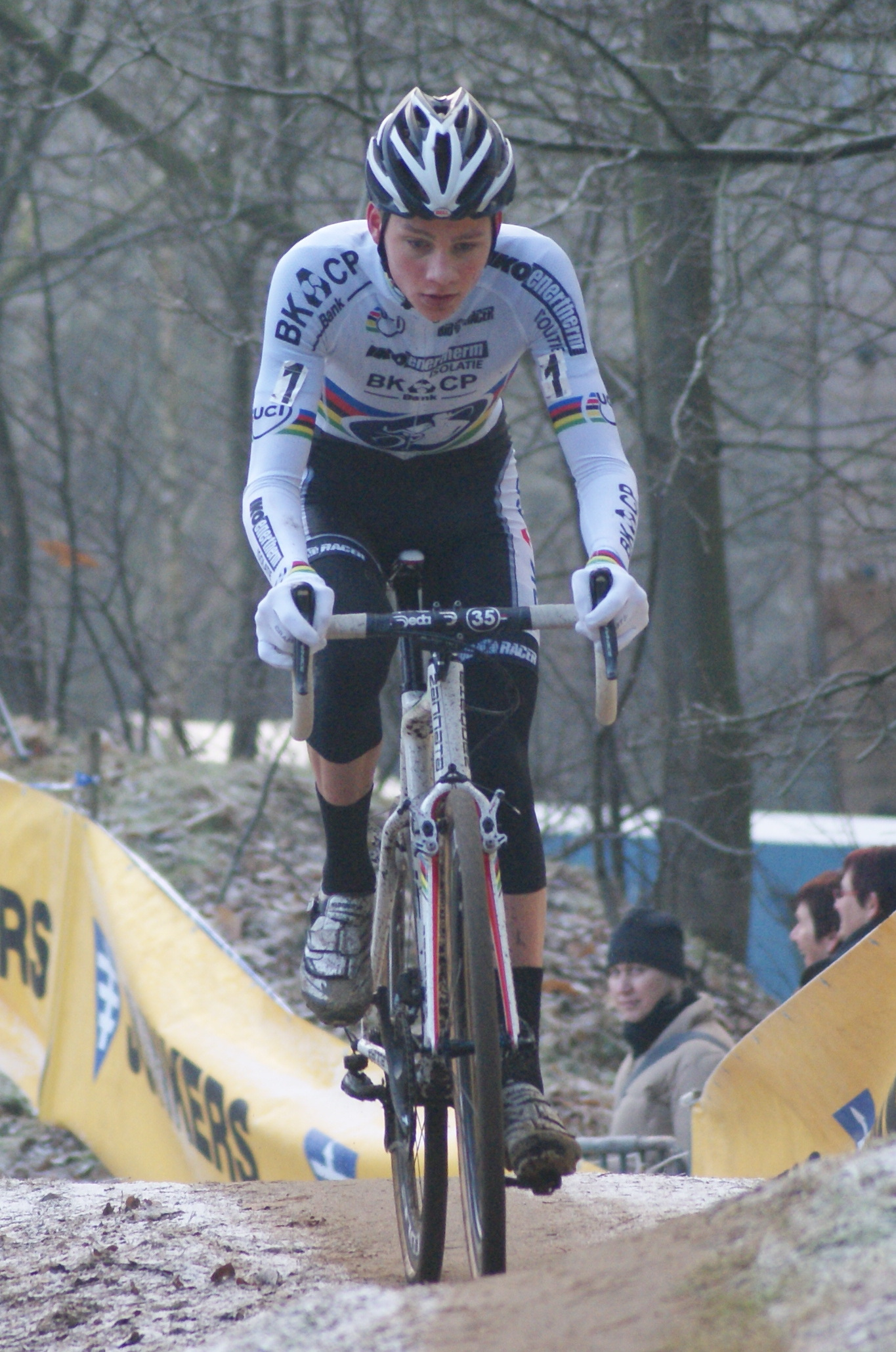 Mathieu van der Poel op weg naar winst in de Krawatencross in Lille in 2013.